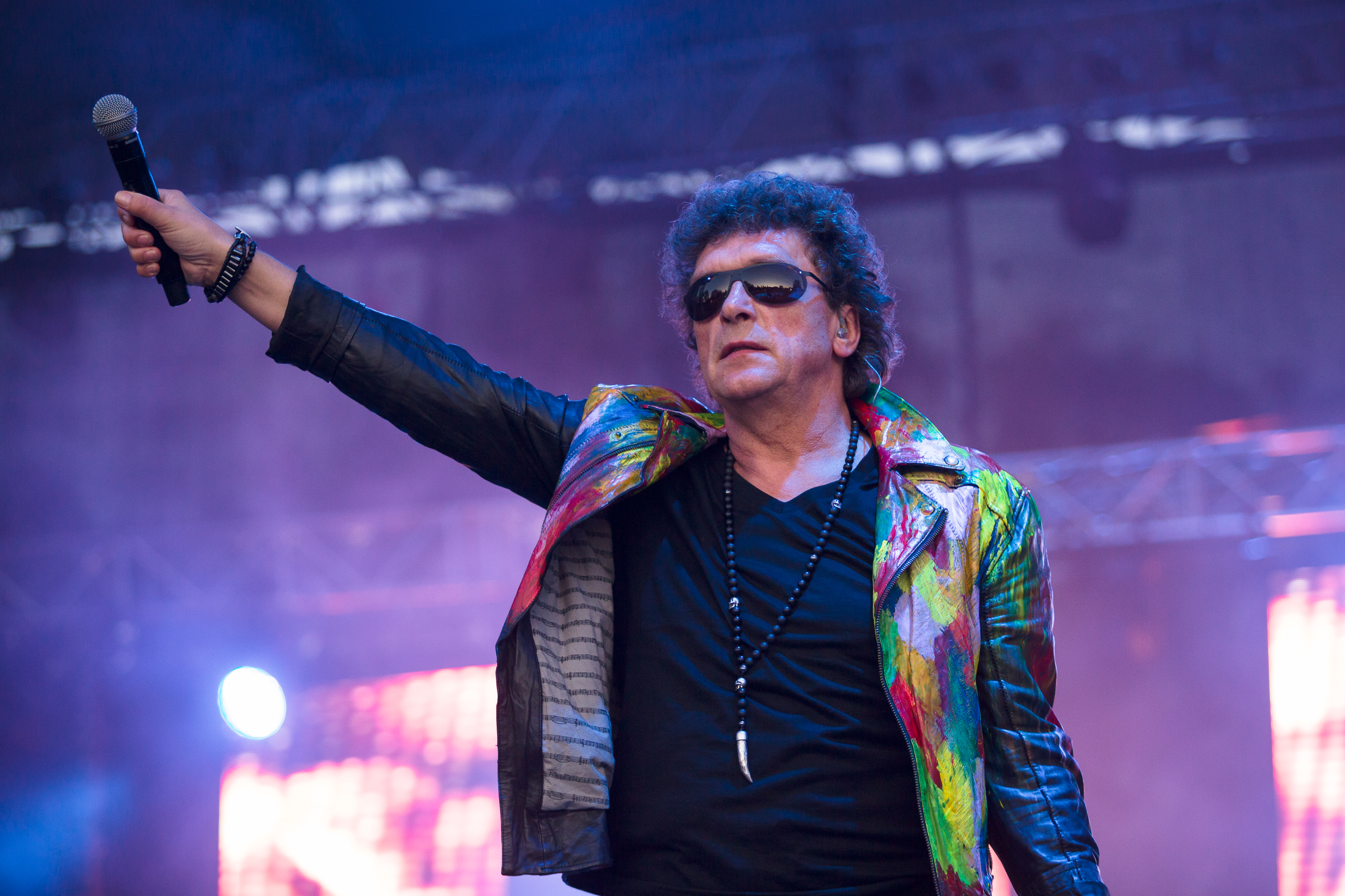 Janusz Panasewicz, koncert Lady Pank podczas Juwenaliów Politechniki Warszawskiej w 2017.